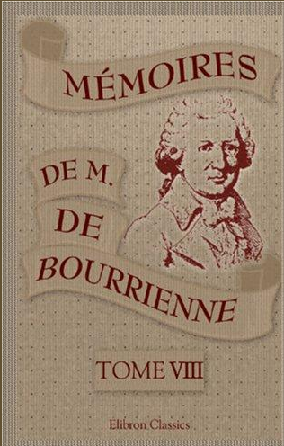 Mémoires de M. de Bourrienne, ministre d'État; sur Napoléon, le Directoire, le Consulat, l'Empire et la Restauration